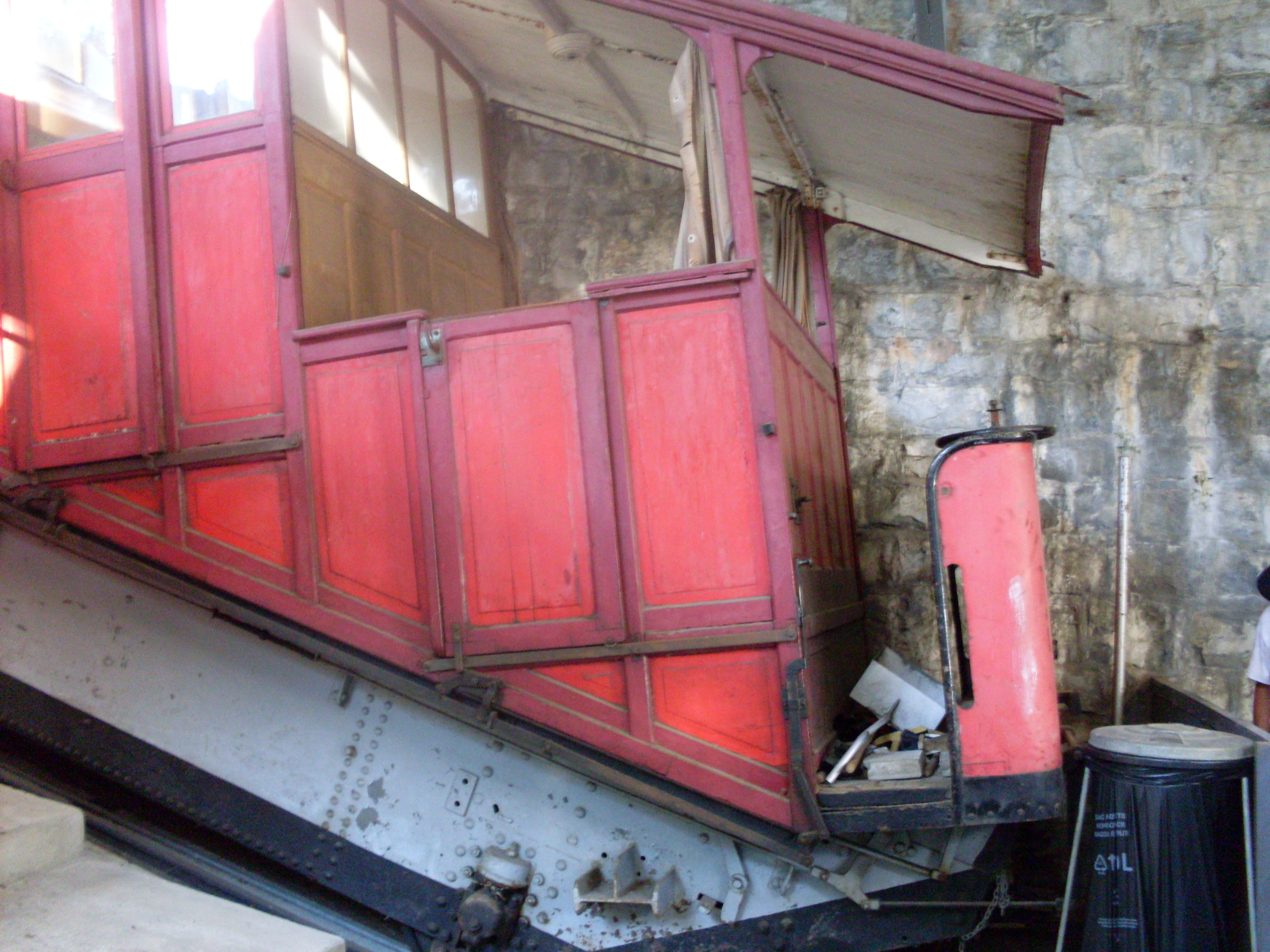 Ausrangierte Kabine der Standseilbahn im Bahnhof Territet, Schweiz